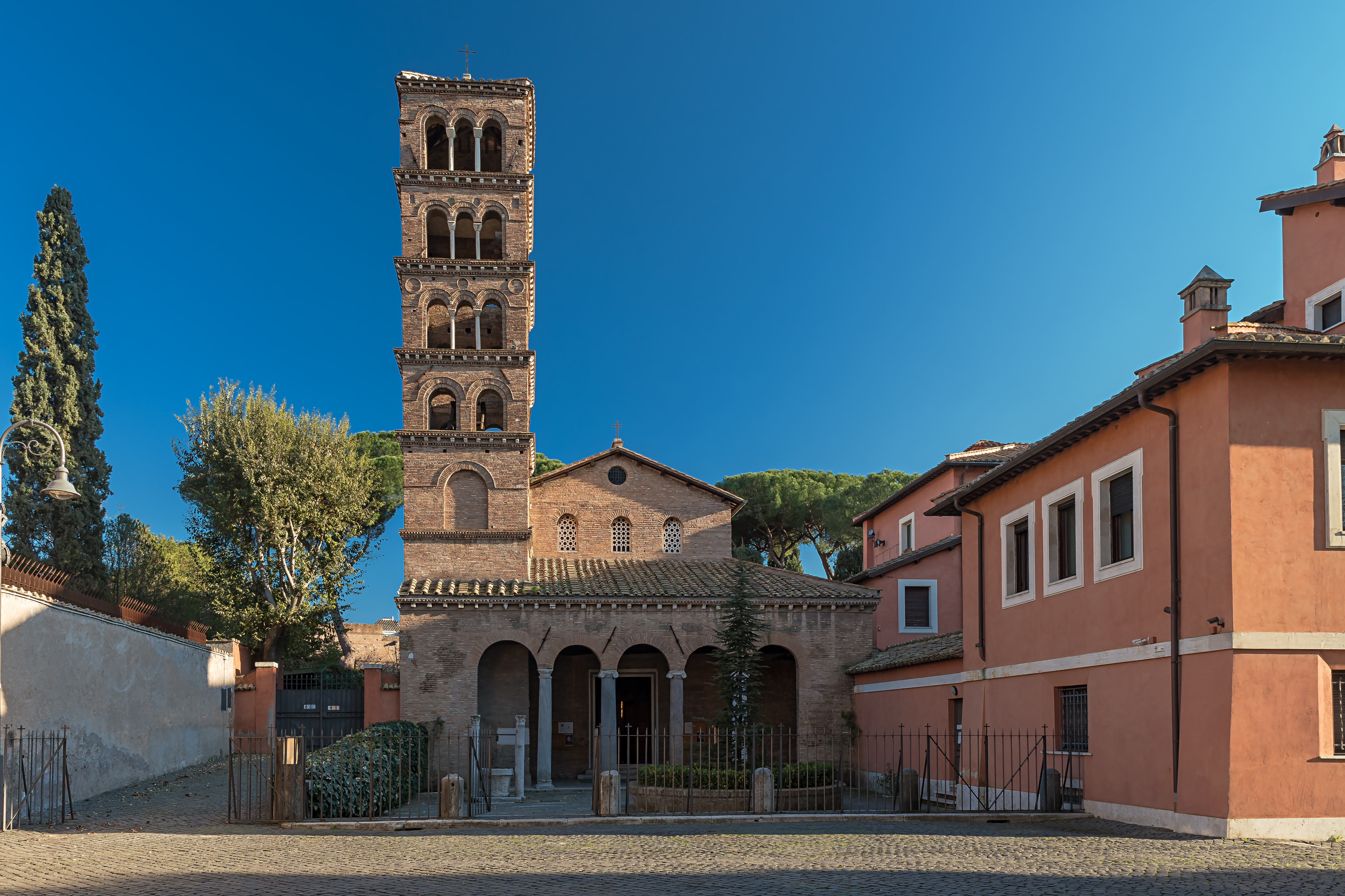 Die Basilika San Giovanni a Porta Latina in Rom